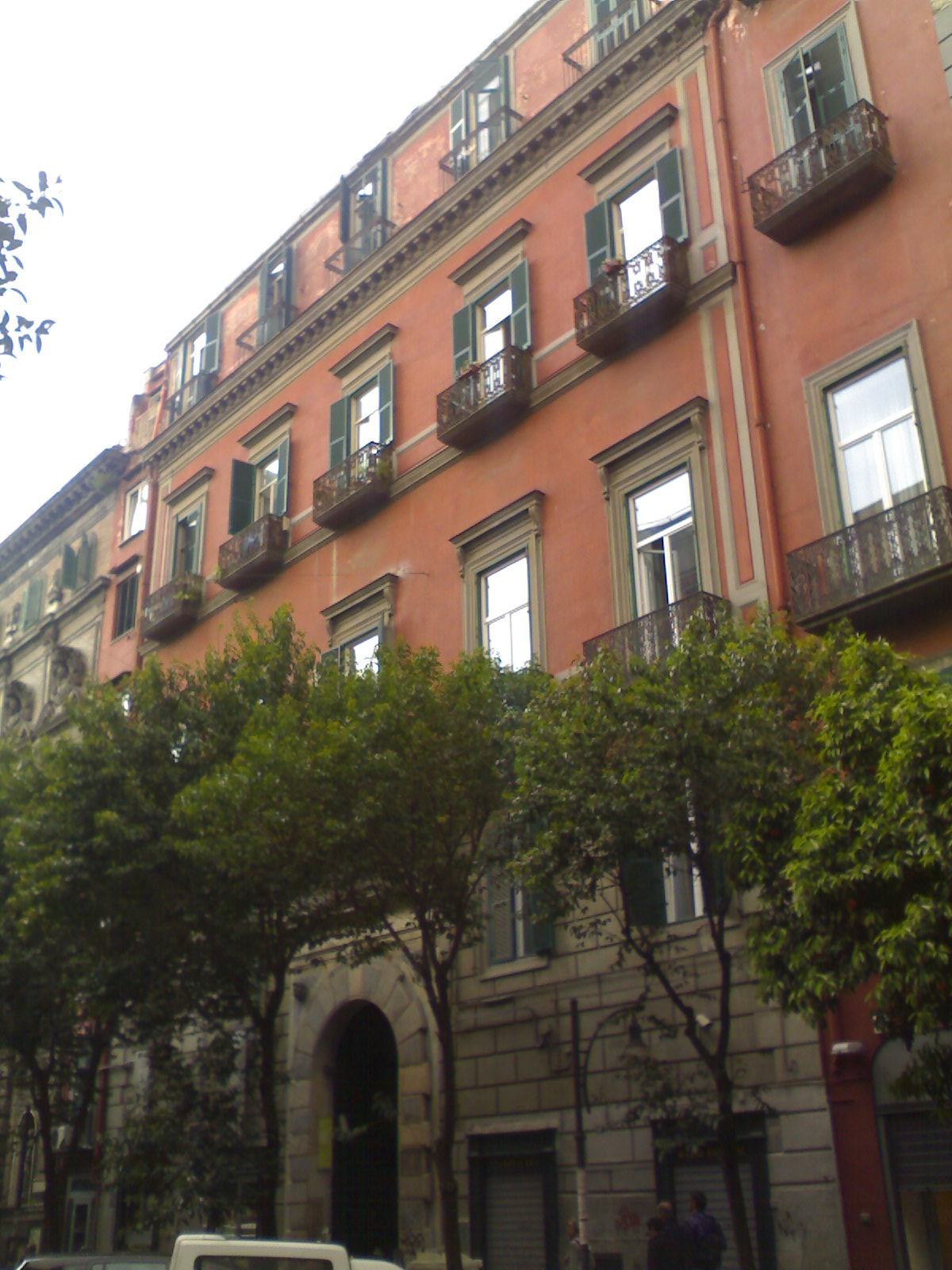 Palazzo Castriota (Napoli)